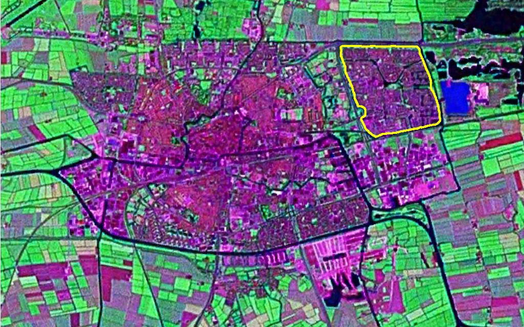 Camminghaburen, Leeuwarden, Nederland